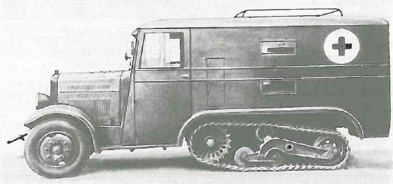 Samochód wz. 34 jako ambulans sanitarny. [opis oryginalny]